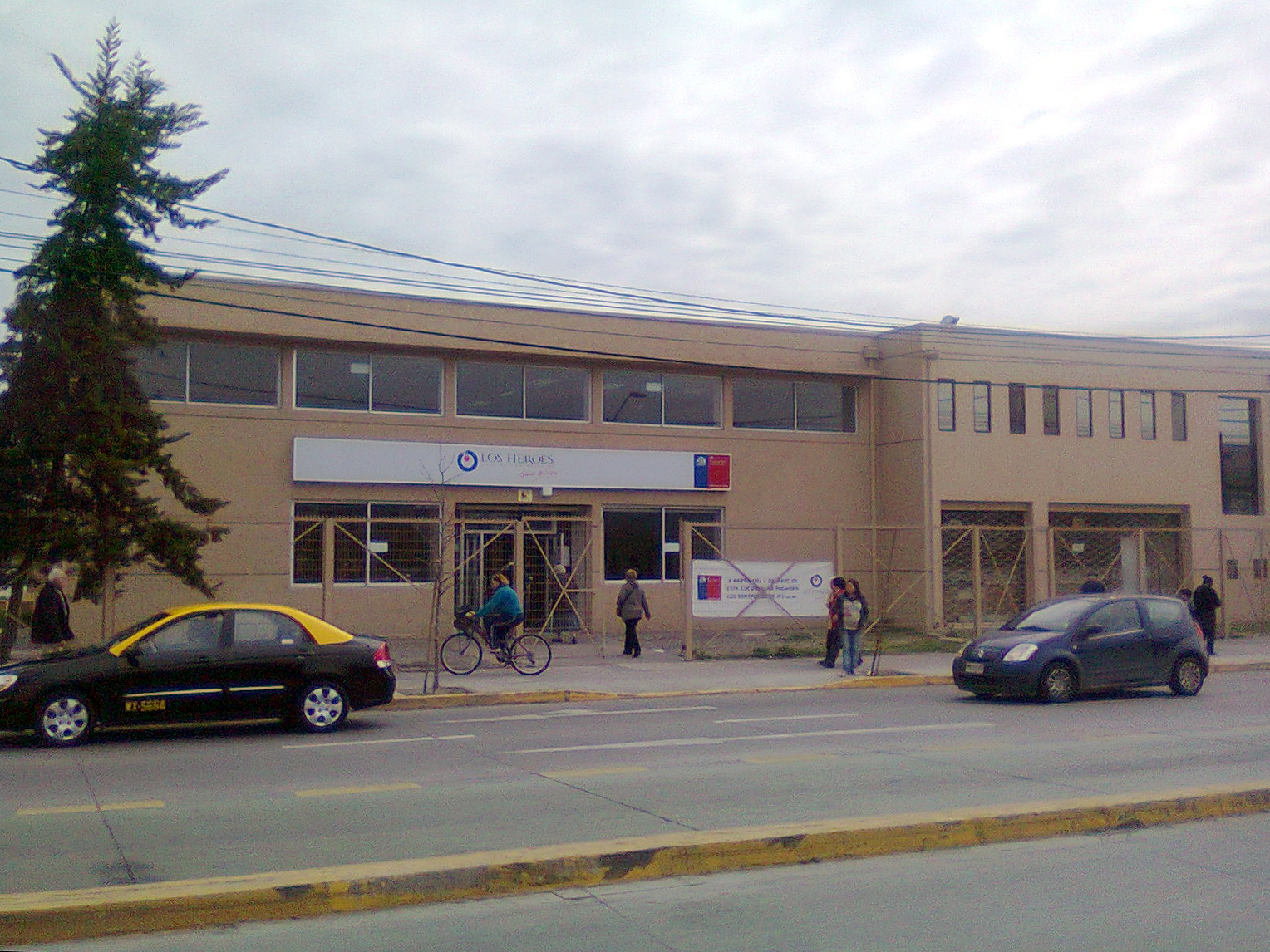 Una sucursal de Caja de Compensación Los Héroes que también sirve como centro de pagos del Instituto de Previsión Social (IPS) en avenida Pajaritos 1380, Maipú, Santiago de Chile. Edificio inaugurado el 2 de mayo de 2011.